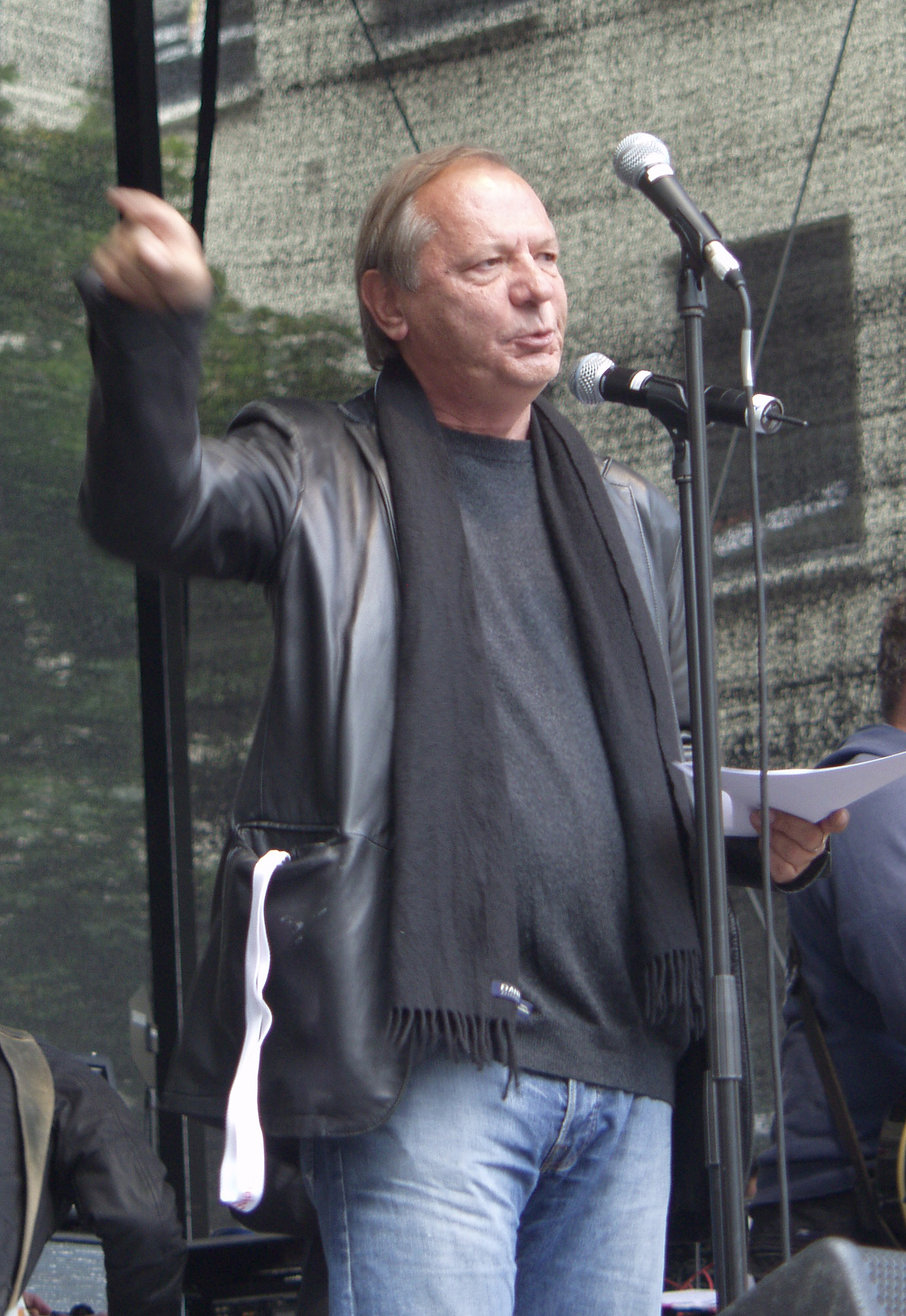 Wilfried Schmickler auf der politischen Demonstration „Köln stellt sich quer“ gegen den so genannten „Anti-Islamisierungskongress“ der rechtsgerichteten Partei „Pro Köln“ vor dem Gürzenich in Köln.